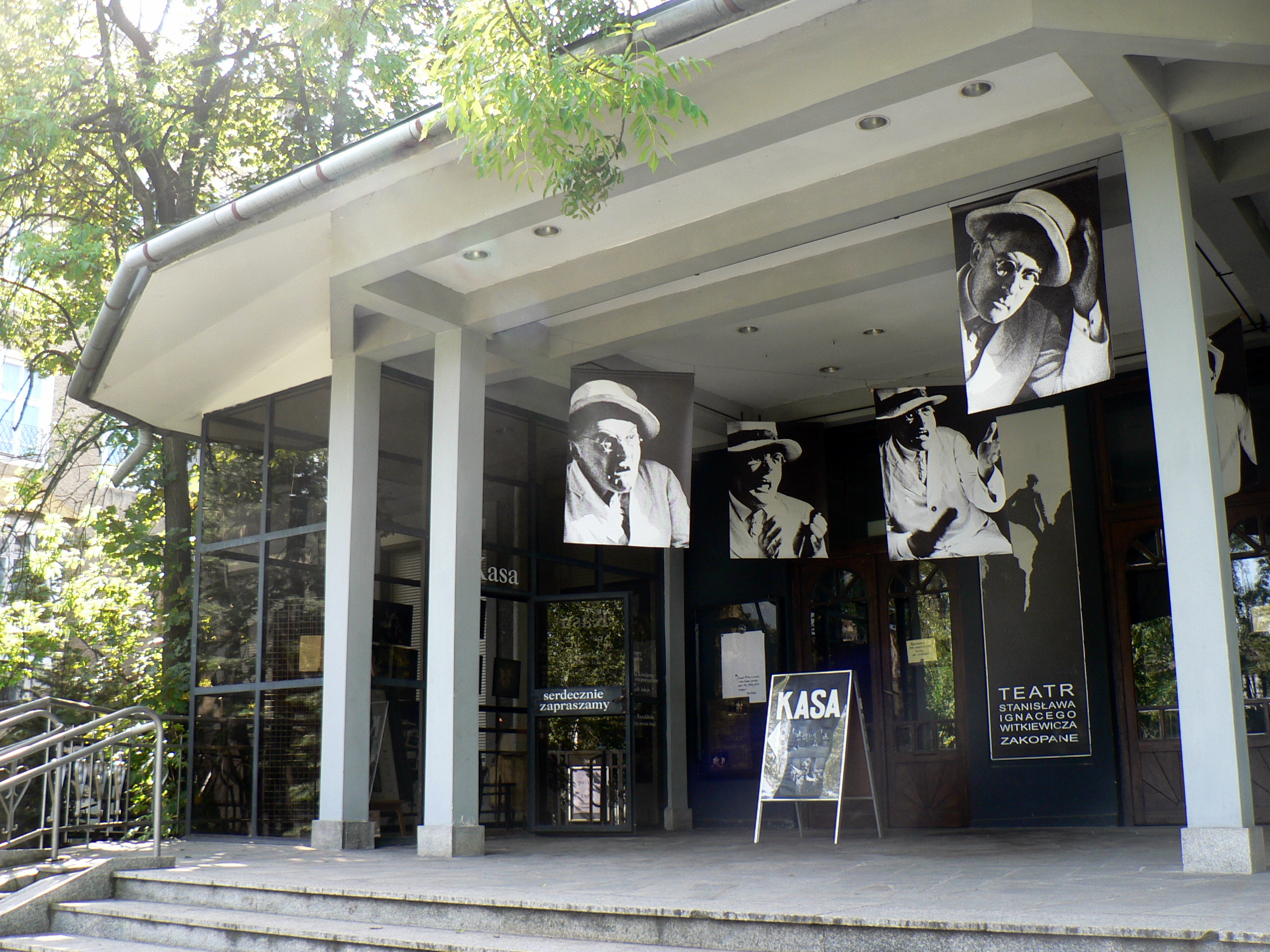 Teatr im. Stanisława Ignacego Witkiewicza w Zakopanem